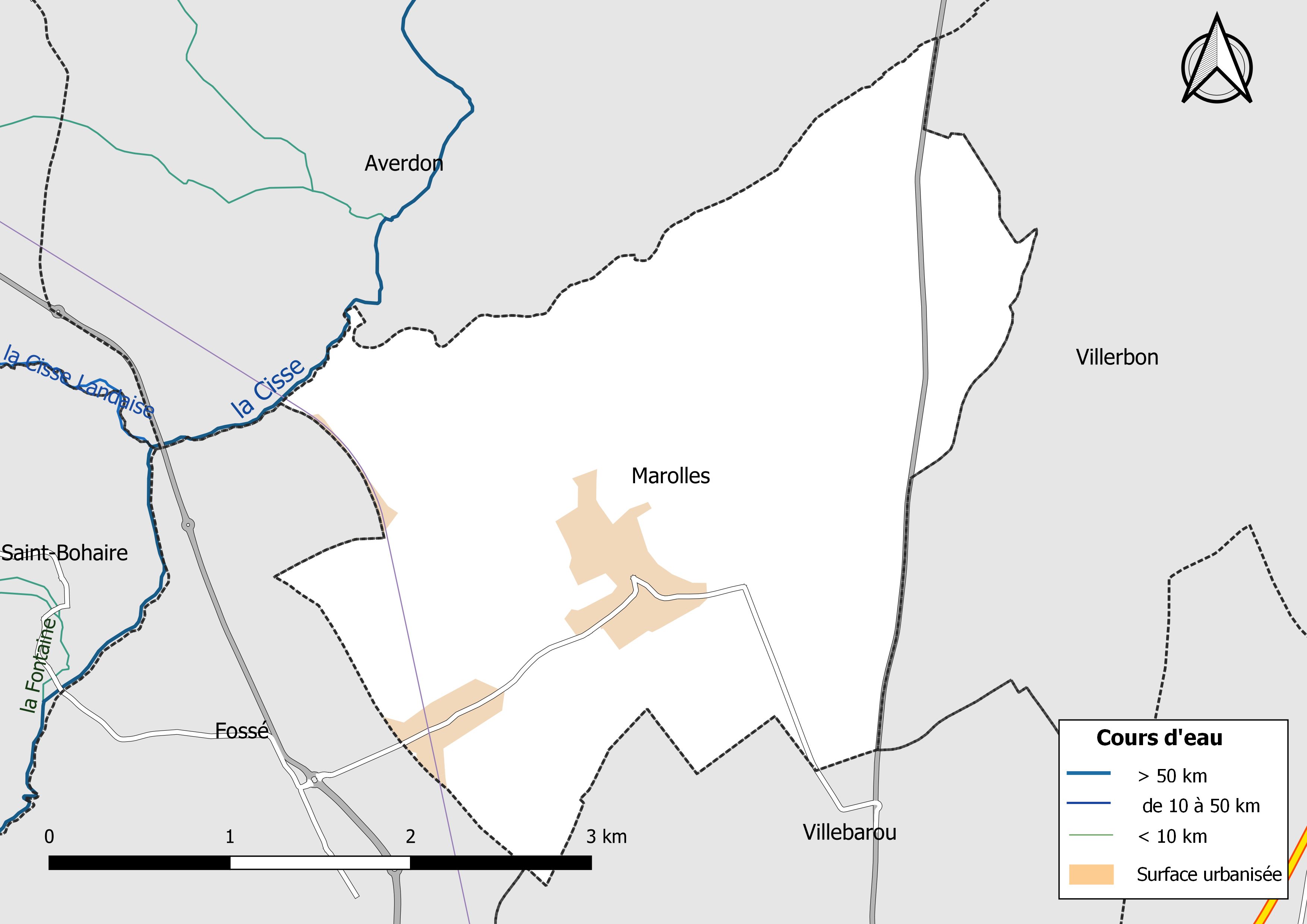 Carte du réseau hydrographique de la commune de Marolles (Loir-et-Cher) (France).